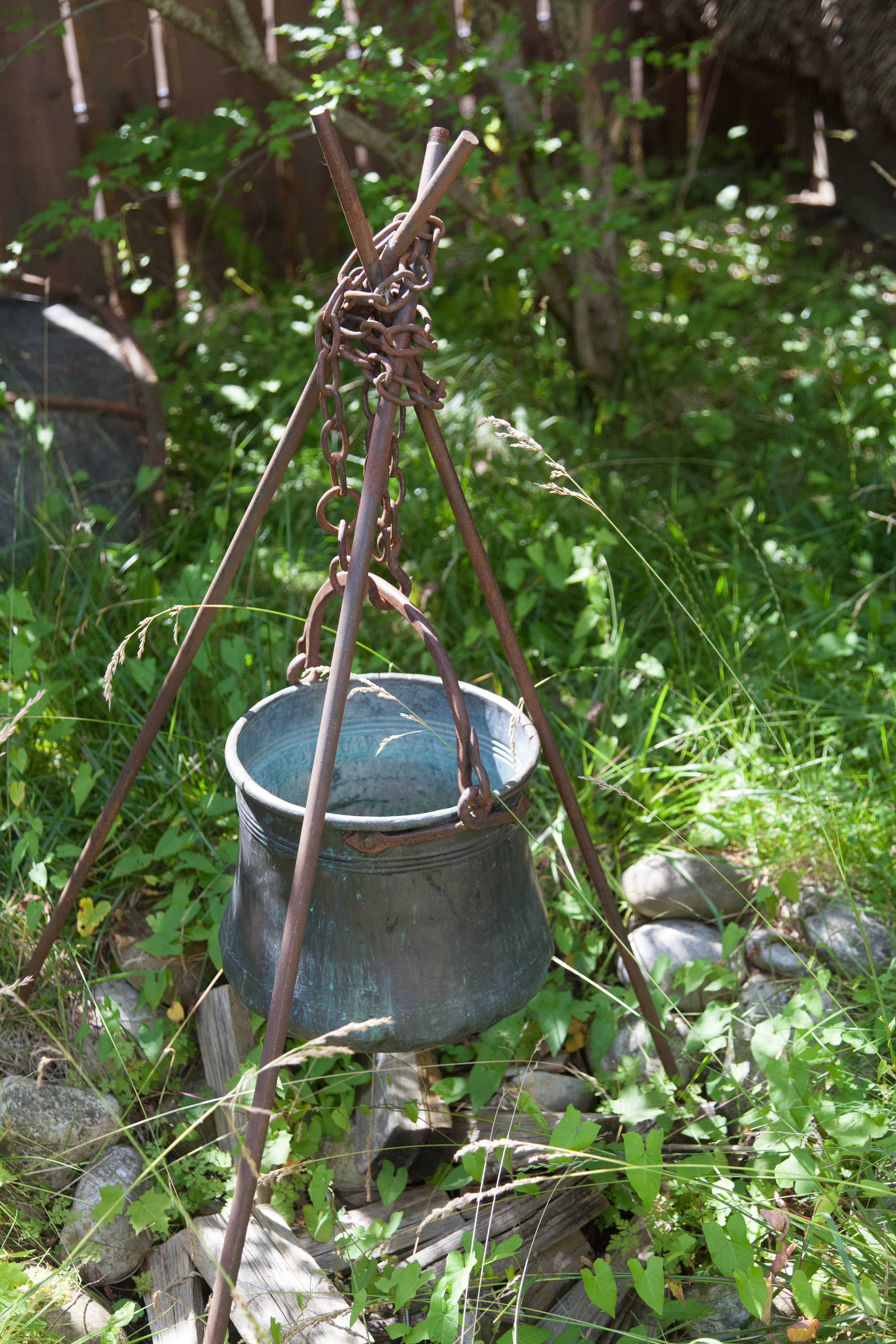 Bavaria Filmstadt Landtagsprojekt Bayern 17. bis 19. Juli 2012 in München Dieses Foto wurde im Rahmen des Projektes „Wikipedia im Landtag“ erstellt.